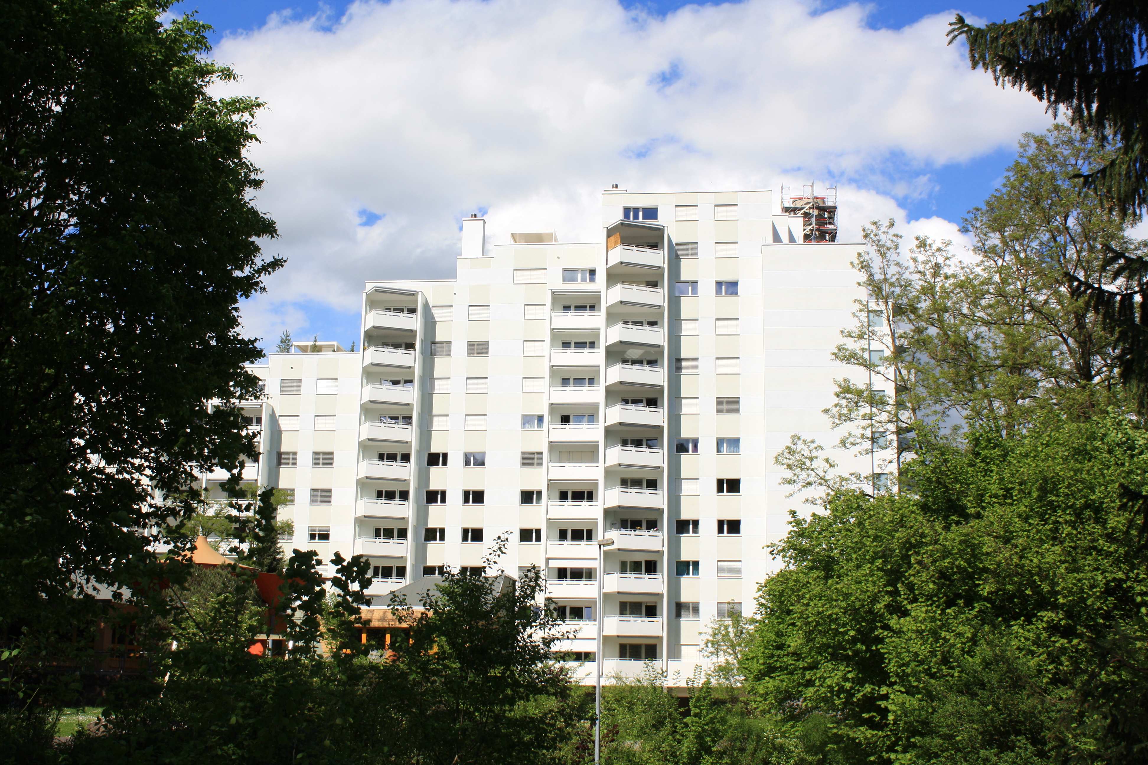 Webermühle